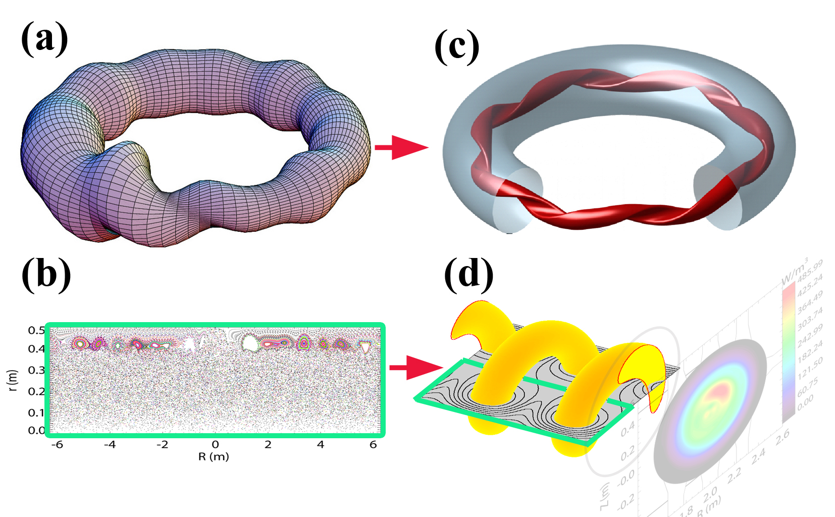 Rappresentazione schematica dello stato elicoidale nell'esperimento RFX-mod.